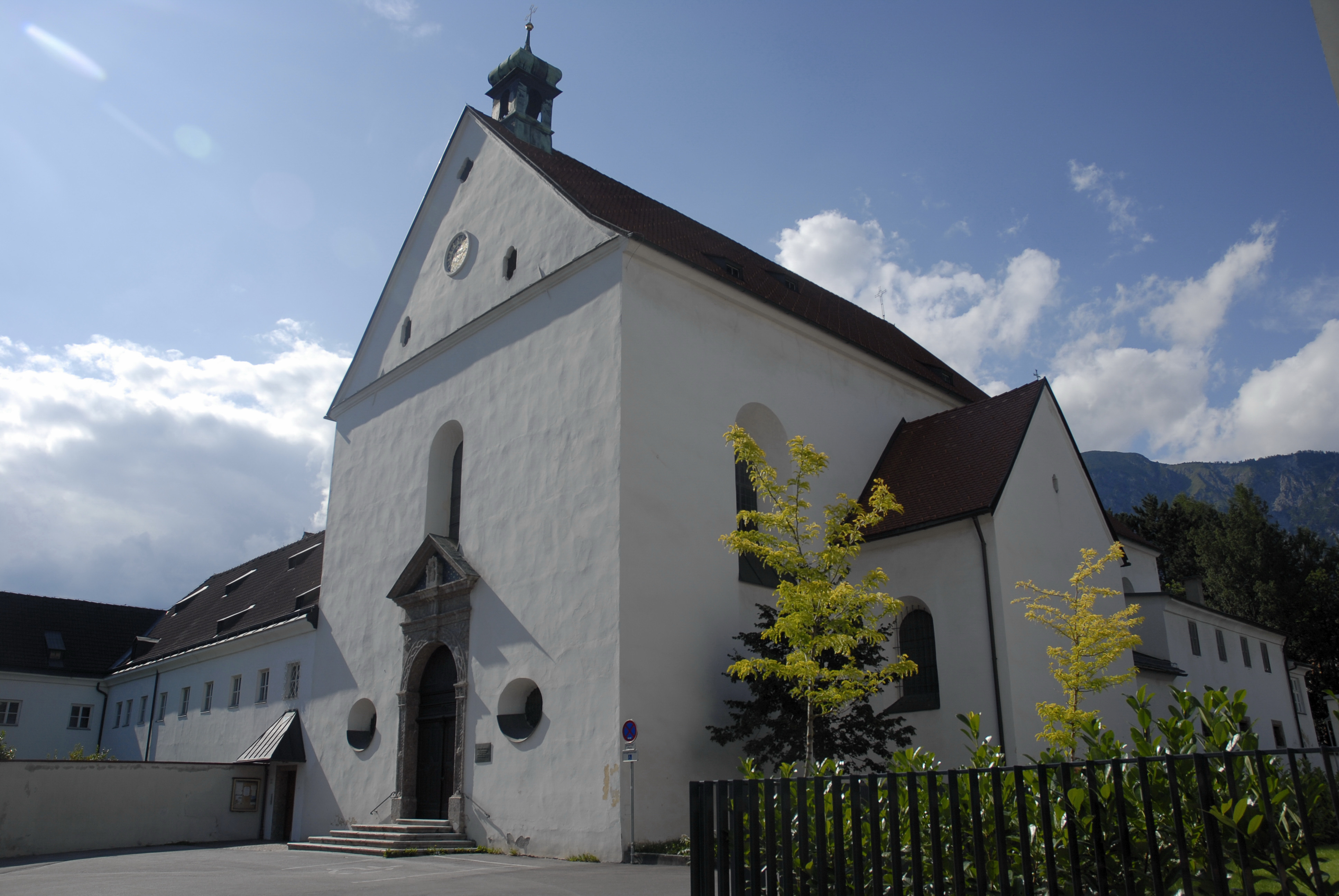 Franziskanerkirche Hall in Tirol